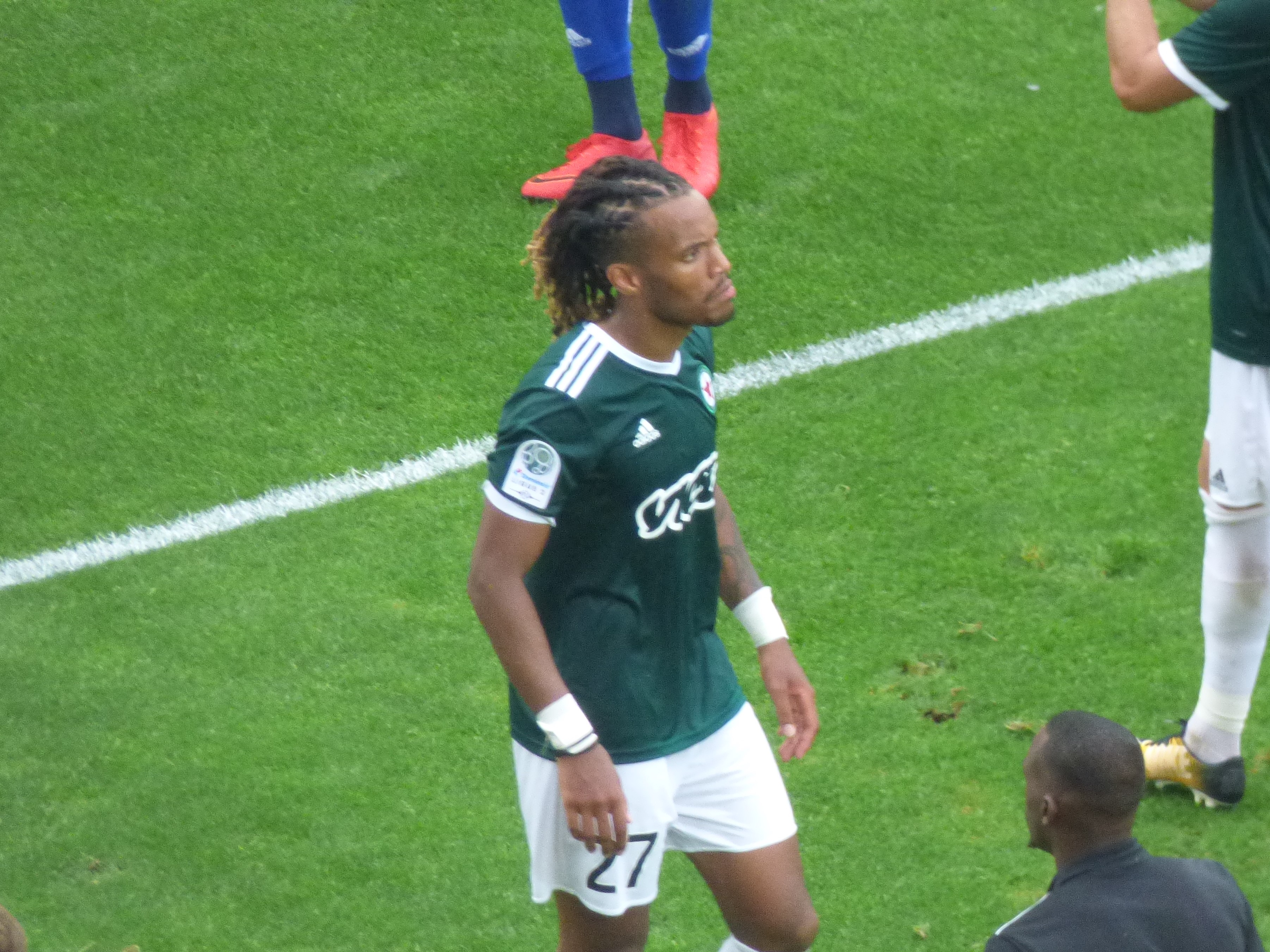 Julio Donisa après le match RC Lens / Red Star, comptant pour la deuxième journée du championnat de France de Ligue 2 2018-2019 au Stade Bollaert-Delelis, le 4 août 2018.